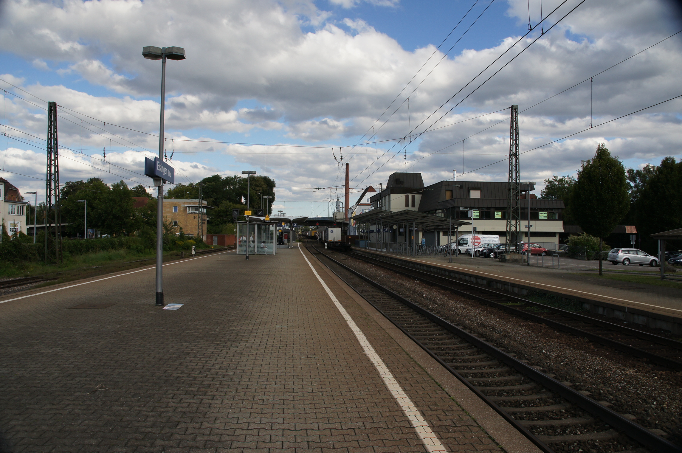 Bahnhof Eislingen